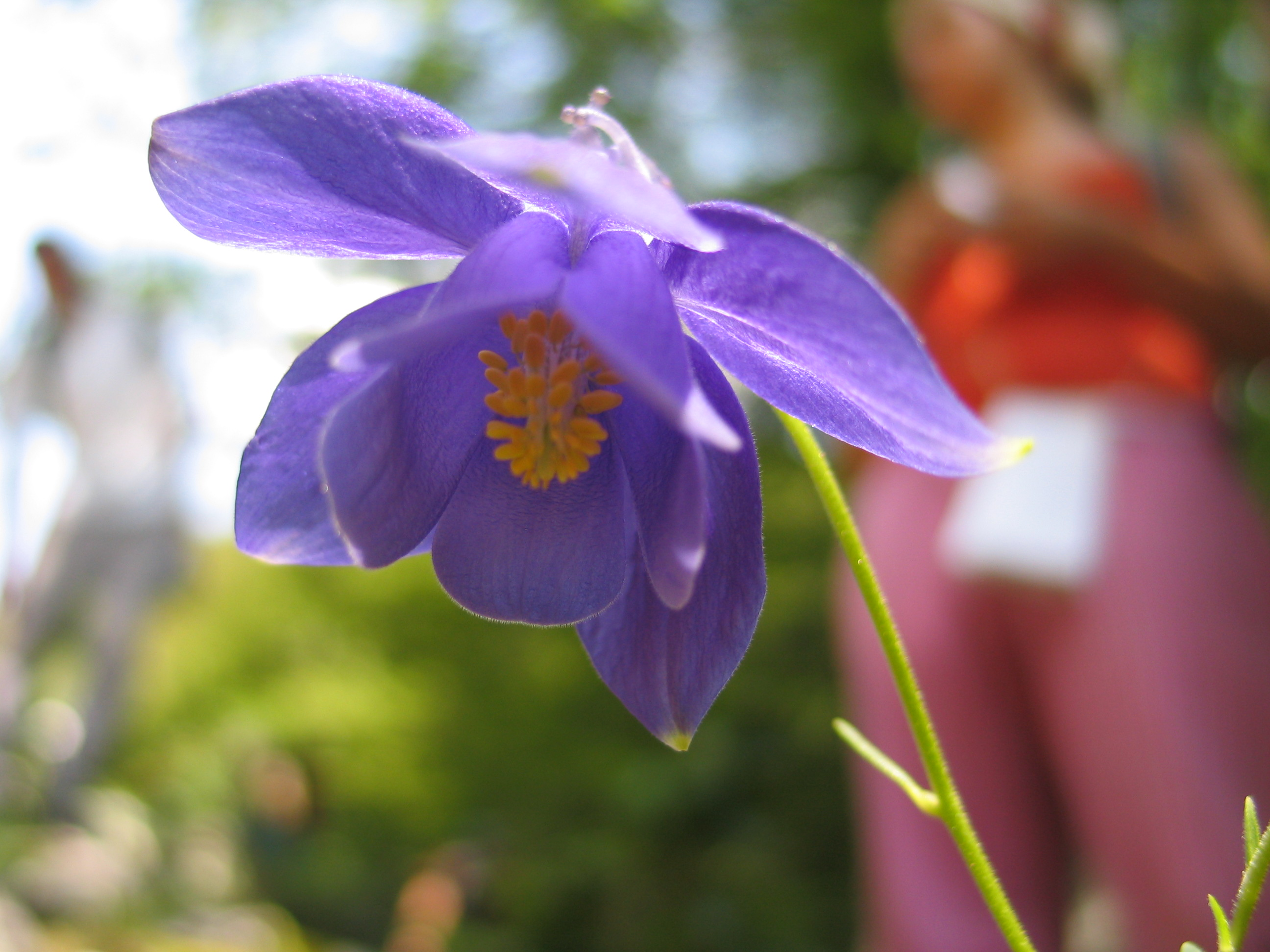 Pirineos, Huesca